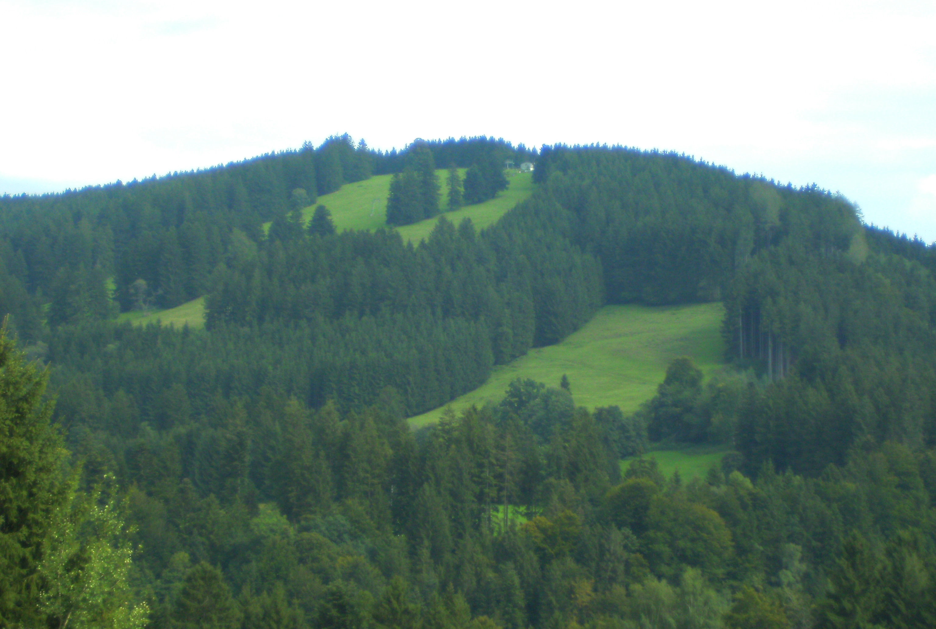 Iberg (Allgäu)